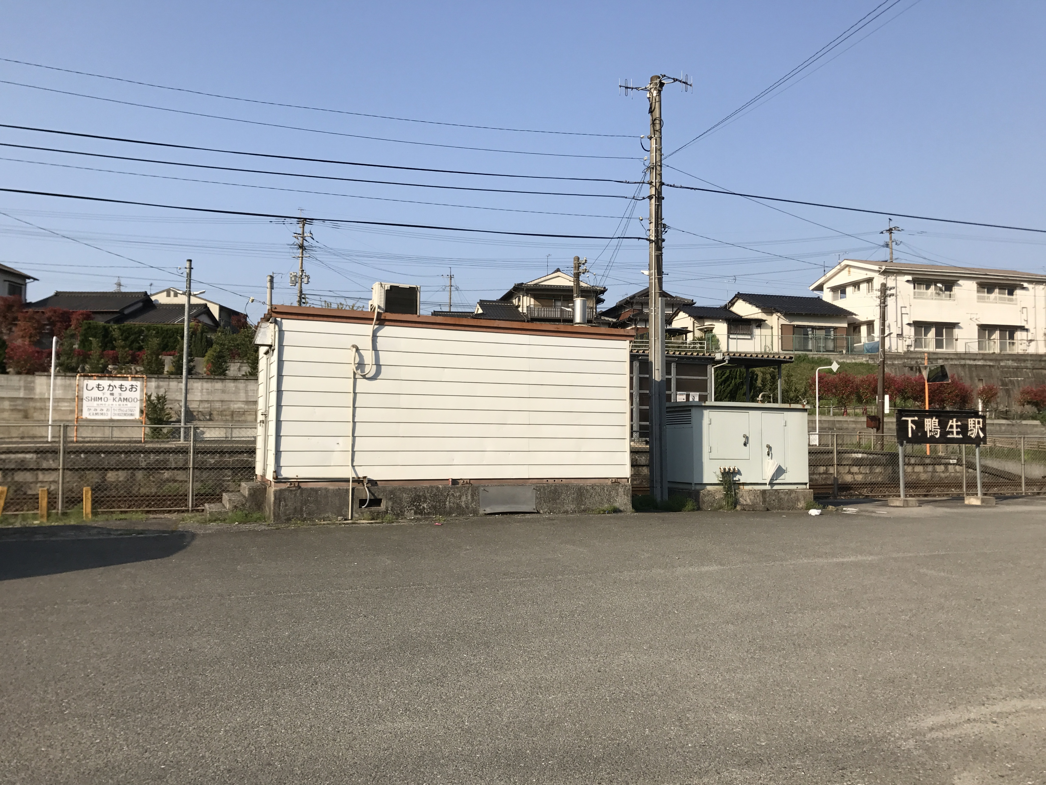 下鴨生駅全景